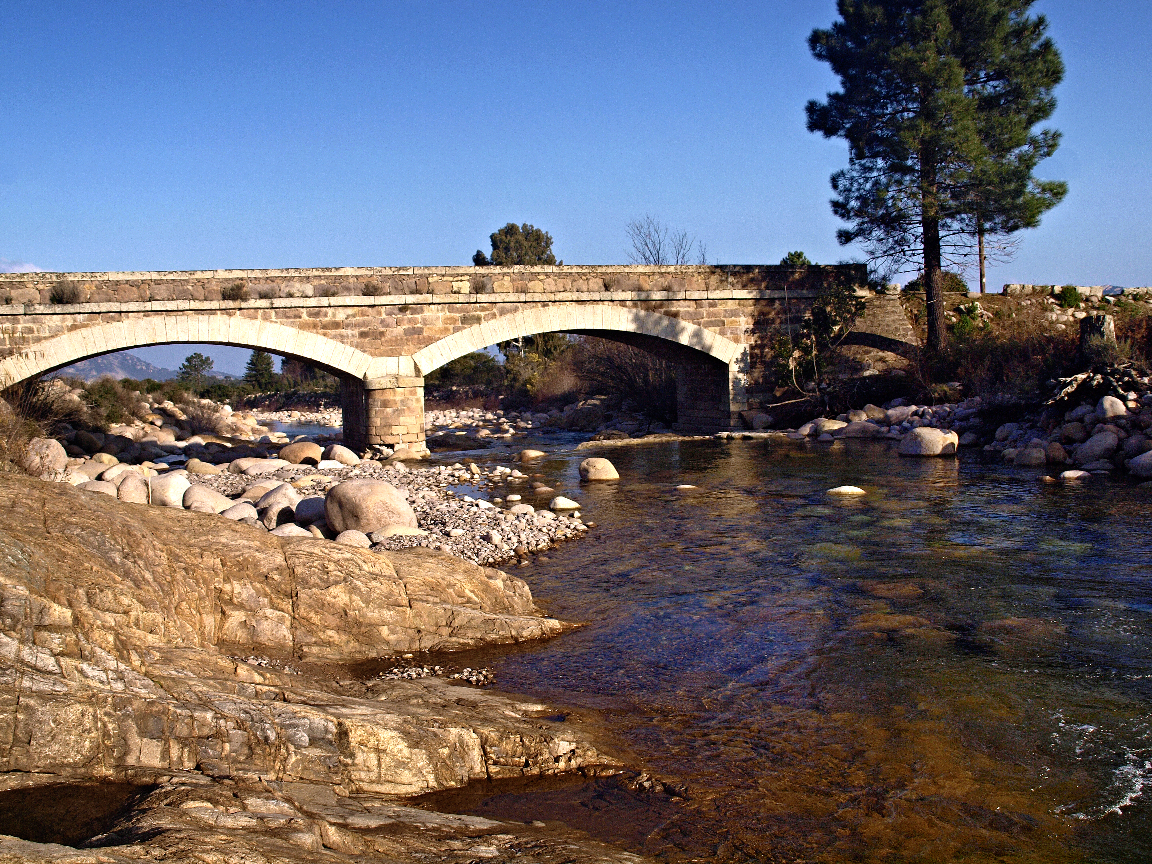 Moncale (Corsica) - Pont de la Figarella